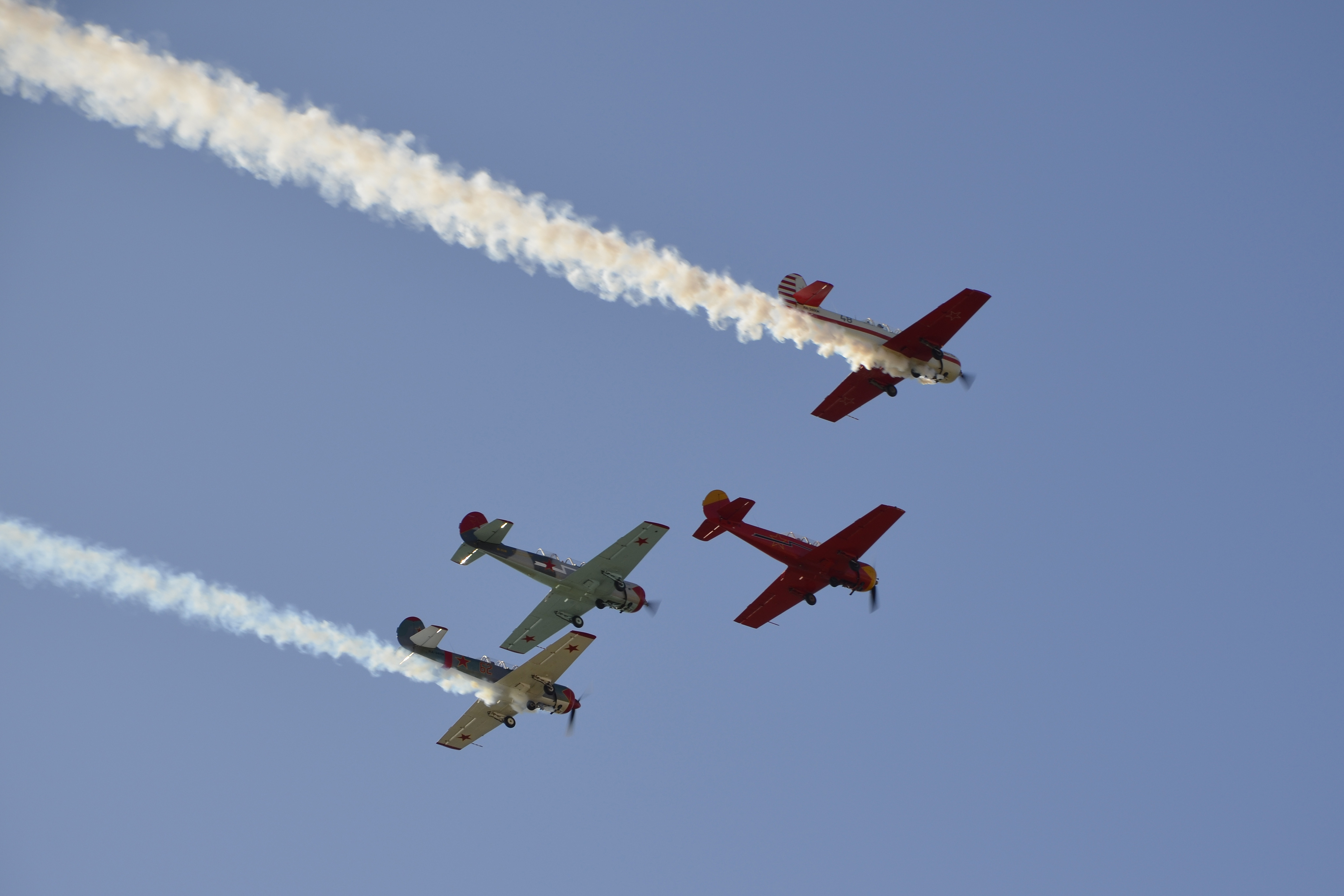 Aerobatics